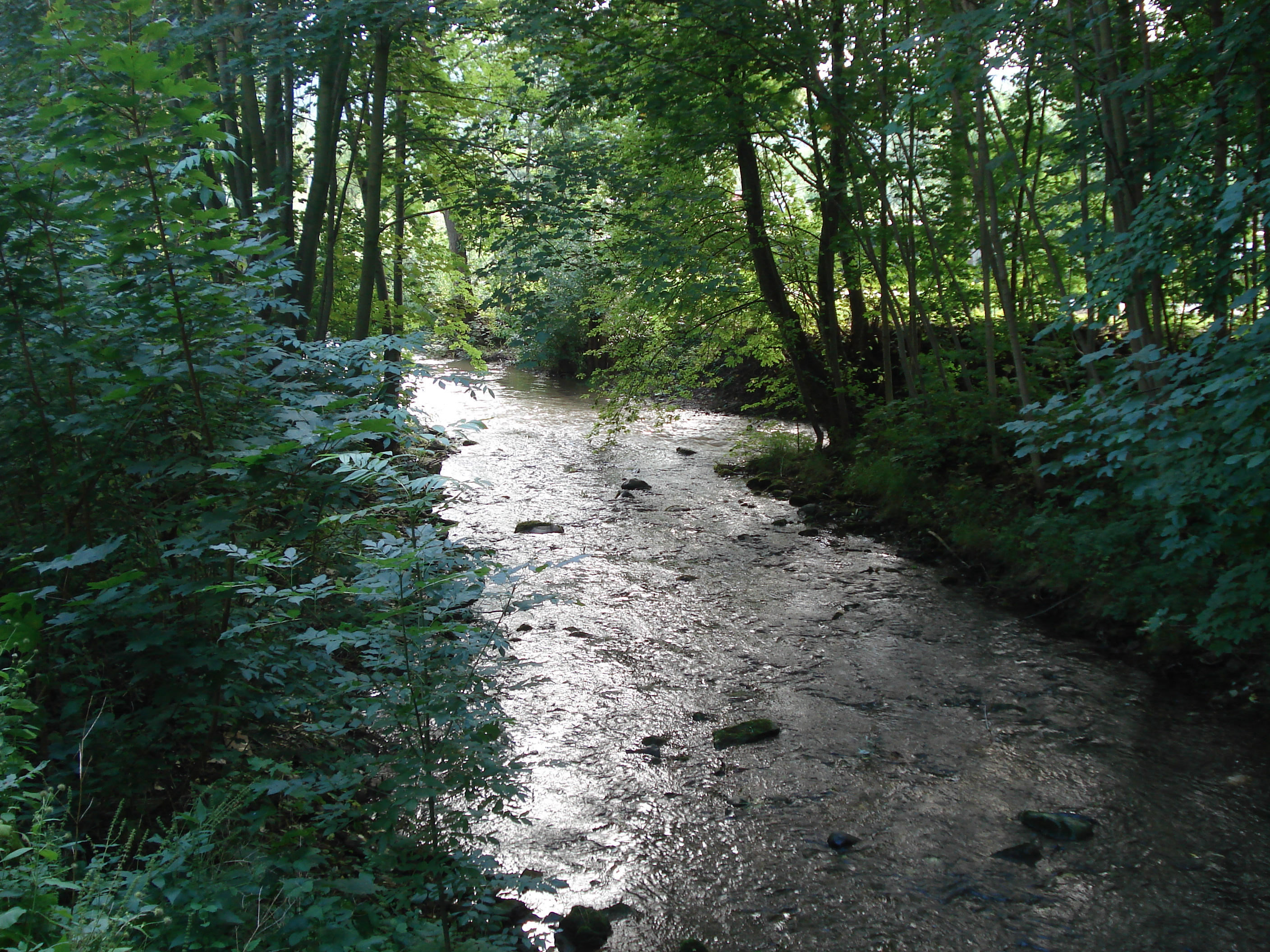 Zusammenfluss von Wilder (links) und Zahmer Gera (rechts) in Plaue